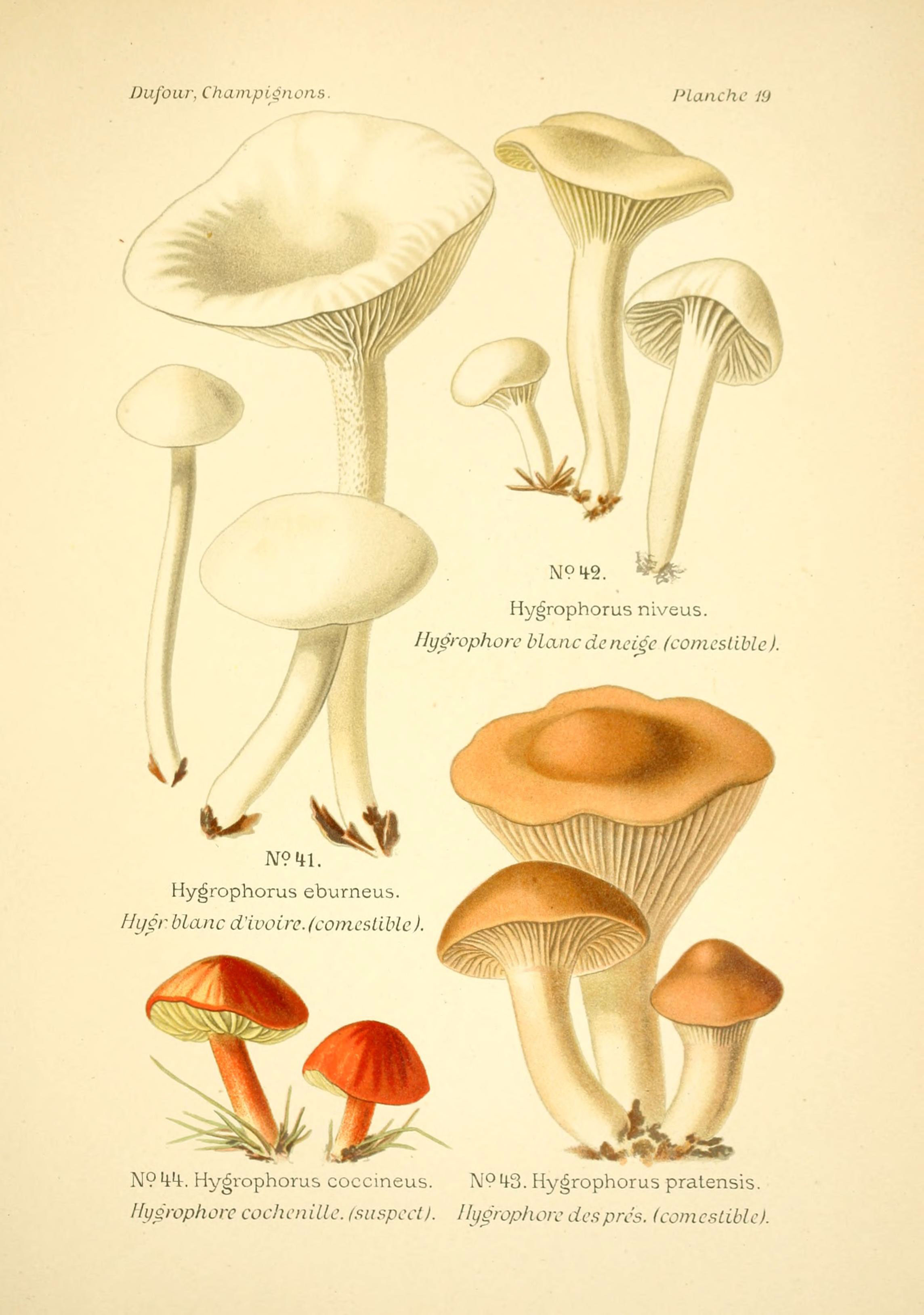 Dufour. Champignons. Planche 19 No. 41. Hygrophorus eburneus. Hygr. blanc d'ivoire. (comestible). No. 42. Hygrophorus niveus. Hygrophore blanc de neige (comestible). No. 43. Hygrophorus pratensis. Hygrophore des prés. (comestible). No. 44. Hygrophorus coccineus. Hygrophore cochenille. (suspect).